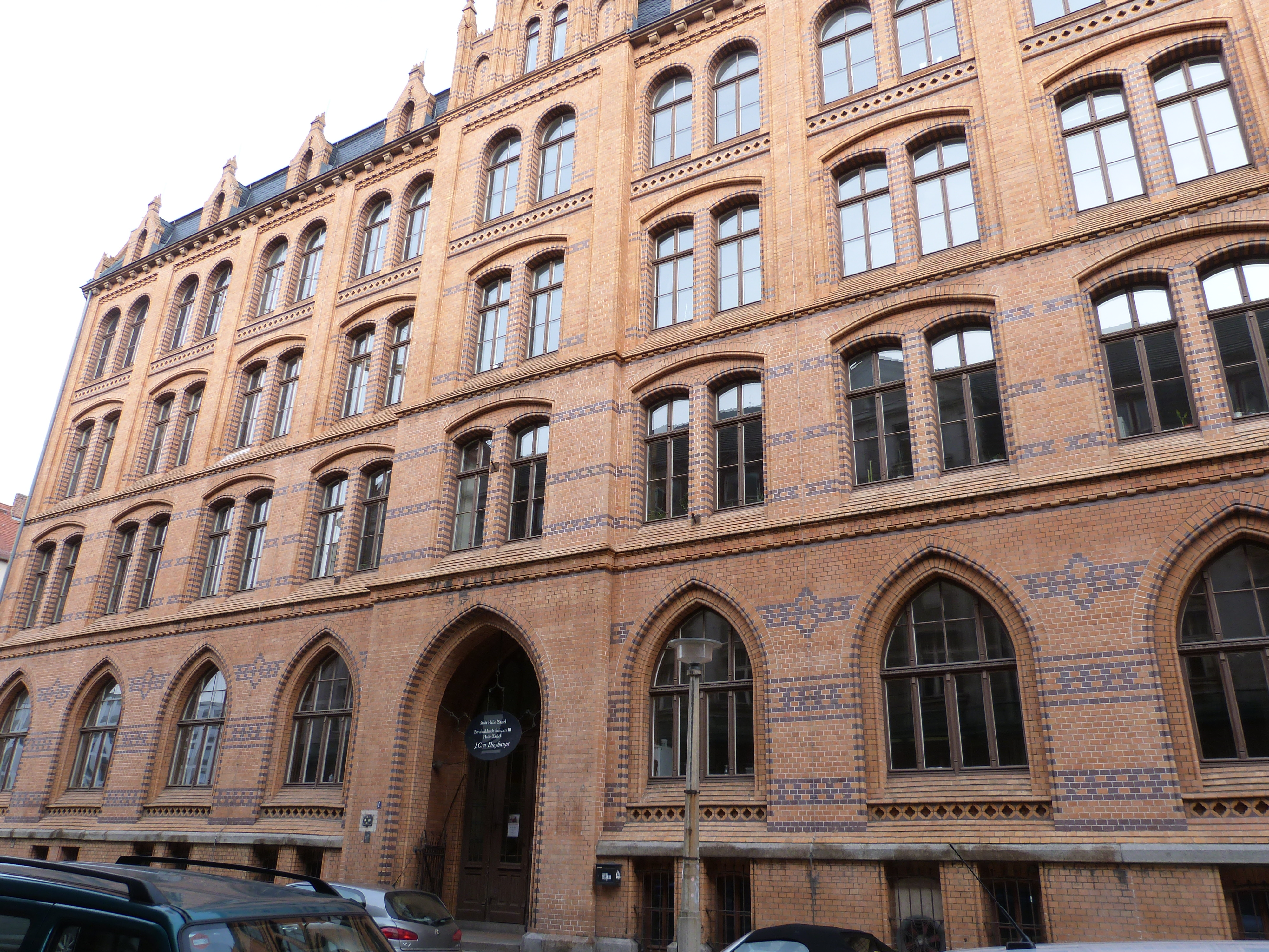 Neues Städtisches Gymansium, zuvor Berufsbildende Schulen III, auch Dreyhauptschule, Dreyhauptstraße 1, Halle (Saale)